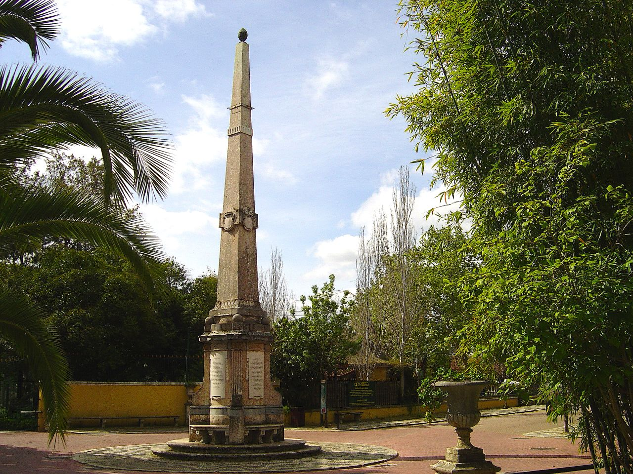 Jardim Zoológico de Lisboa - Portugal